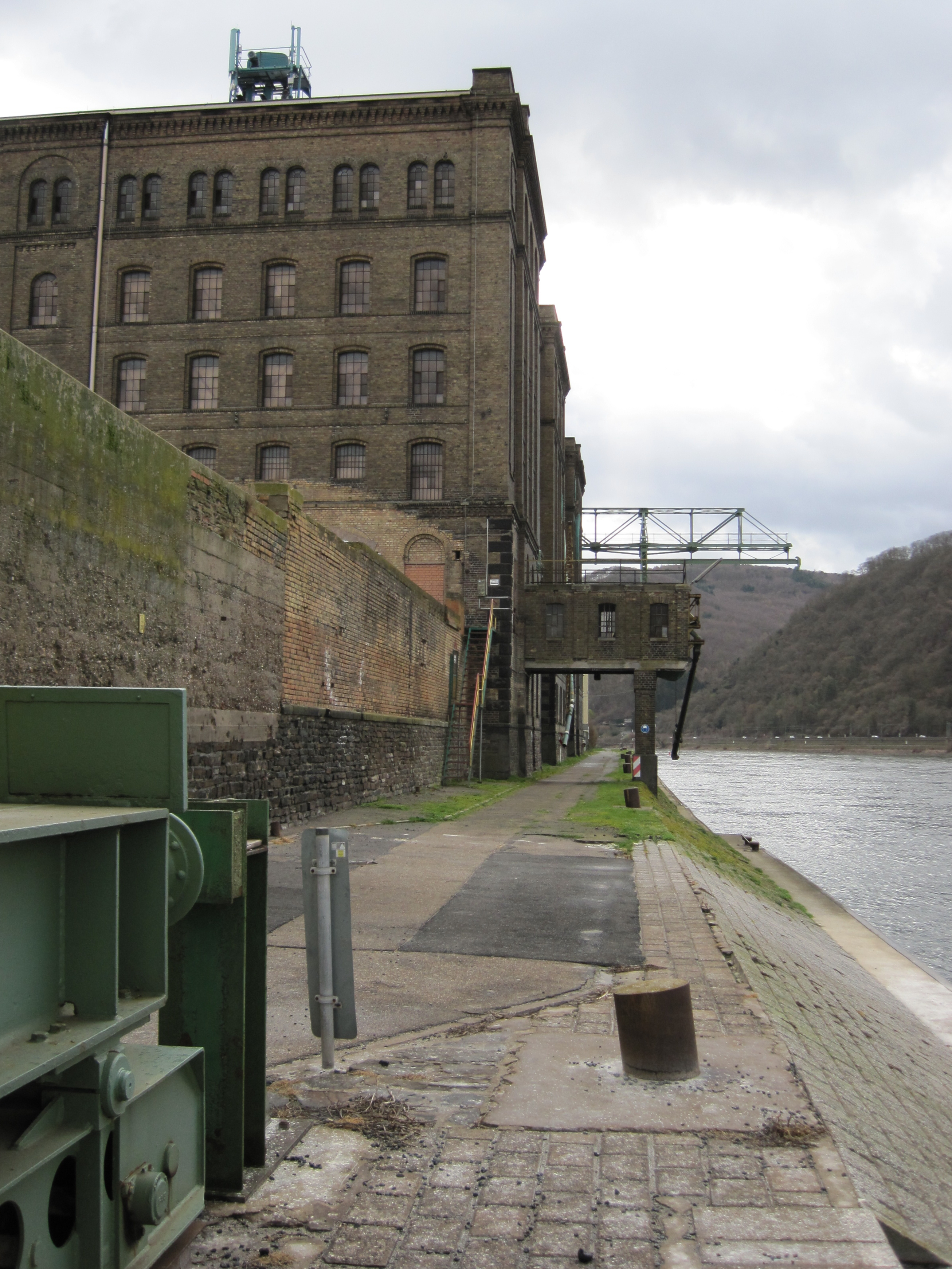 Löhnberger Mühle, Lahnstein. Die Getreidemühle wurde 1890 als damals größte Dampfmühle Deutschlands gebaut. Sie steht inzwischen unter Denkmalschutz und gehört heute zum Stromhafen Lahnstein.